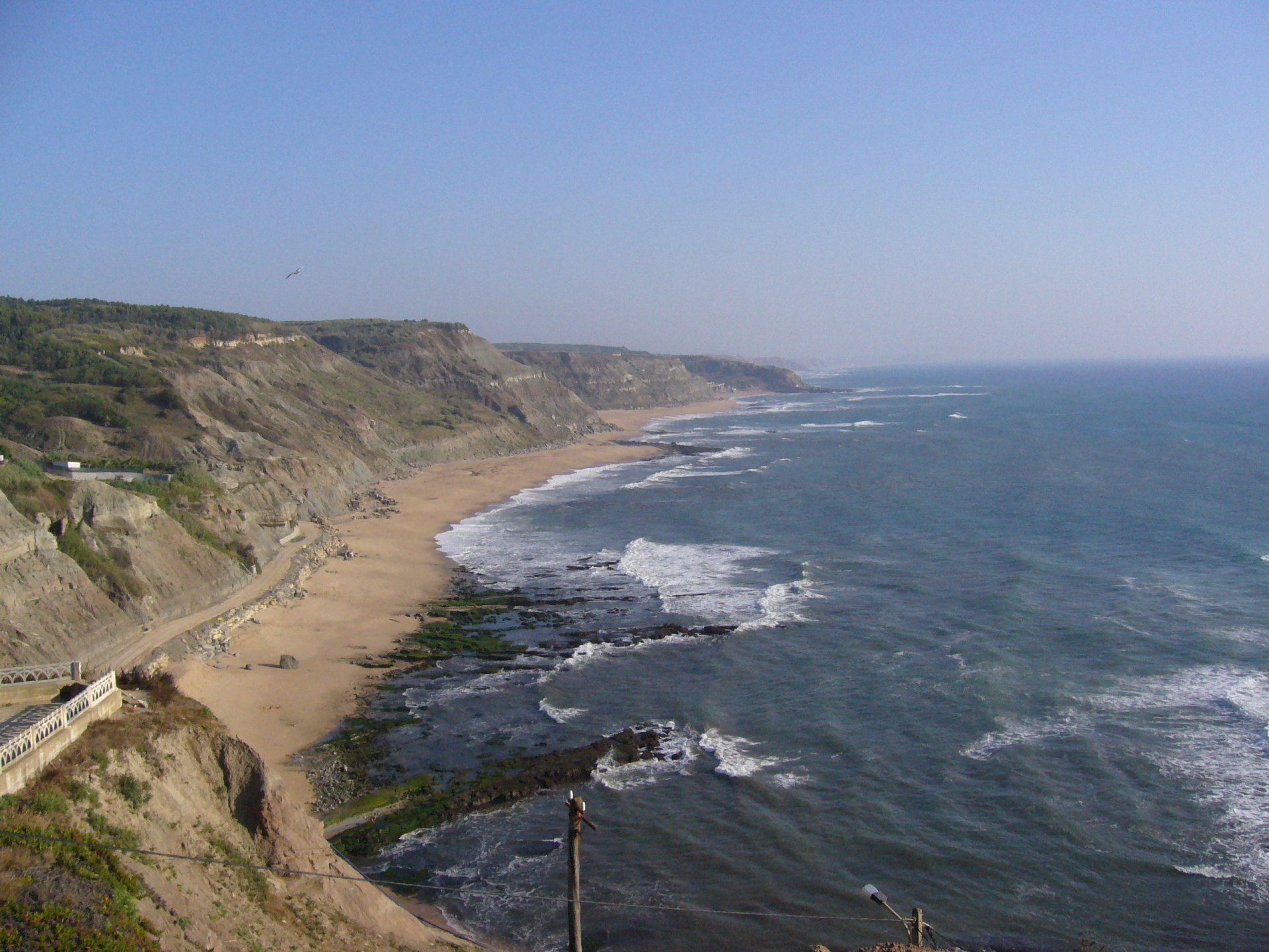 Küstenstreifen bei Lourinha (Portugal), Praia do Porto das Barcas